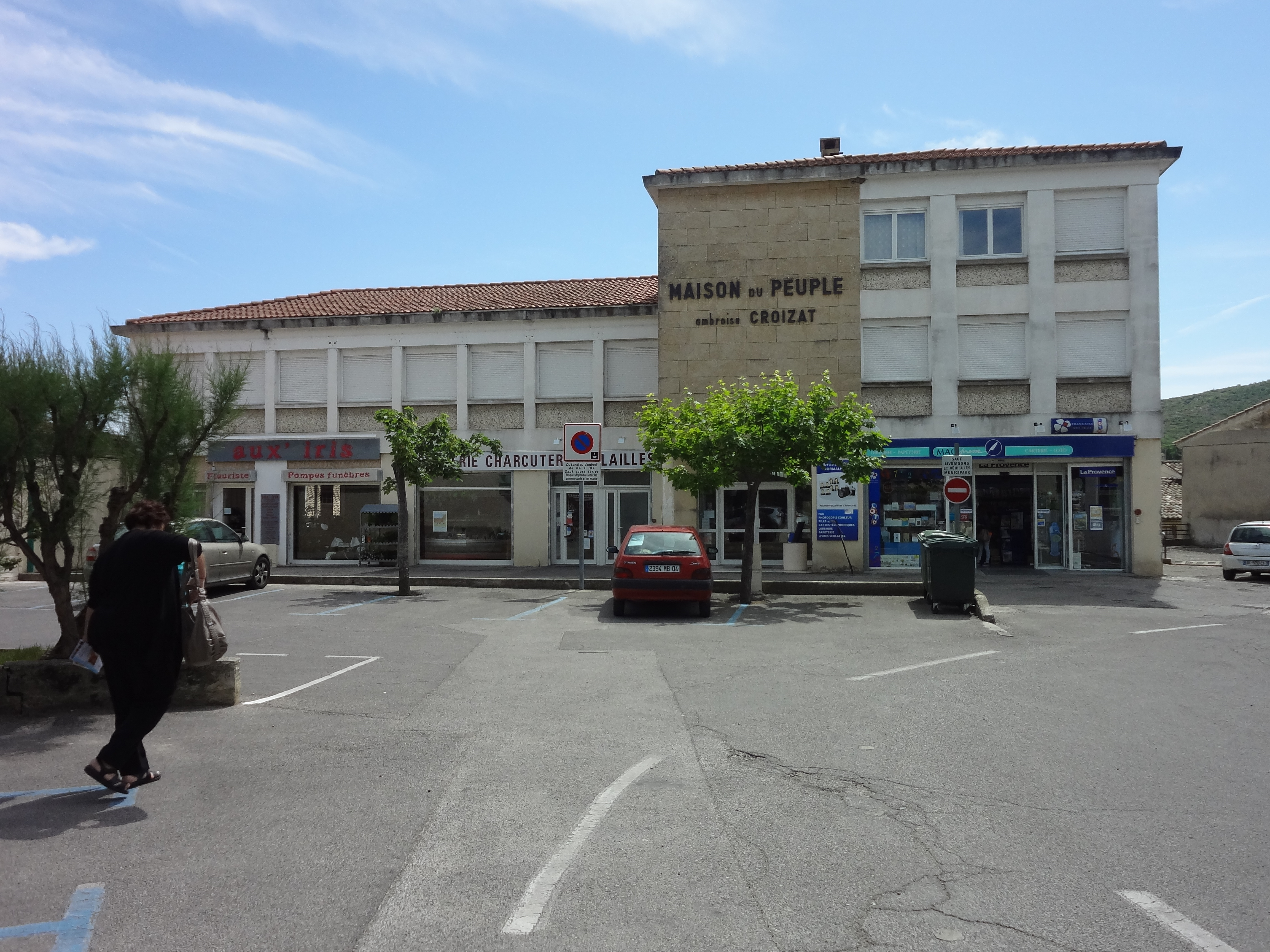 Maison du peuple de Sainte-Tulle, qui porte le nom d'Ambroise Croizat